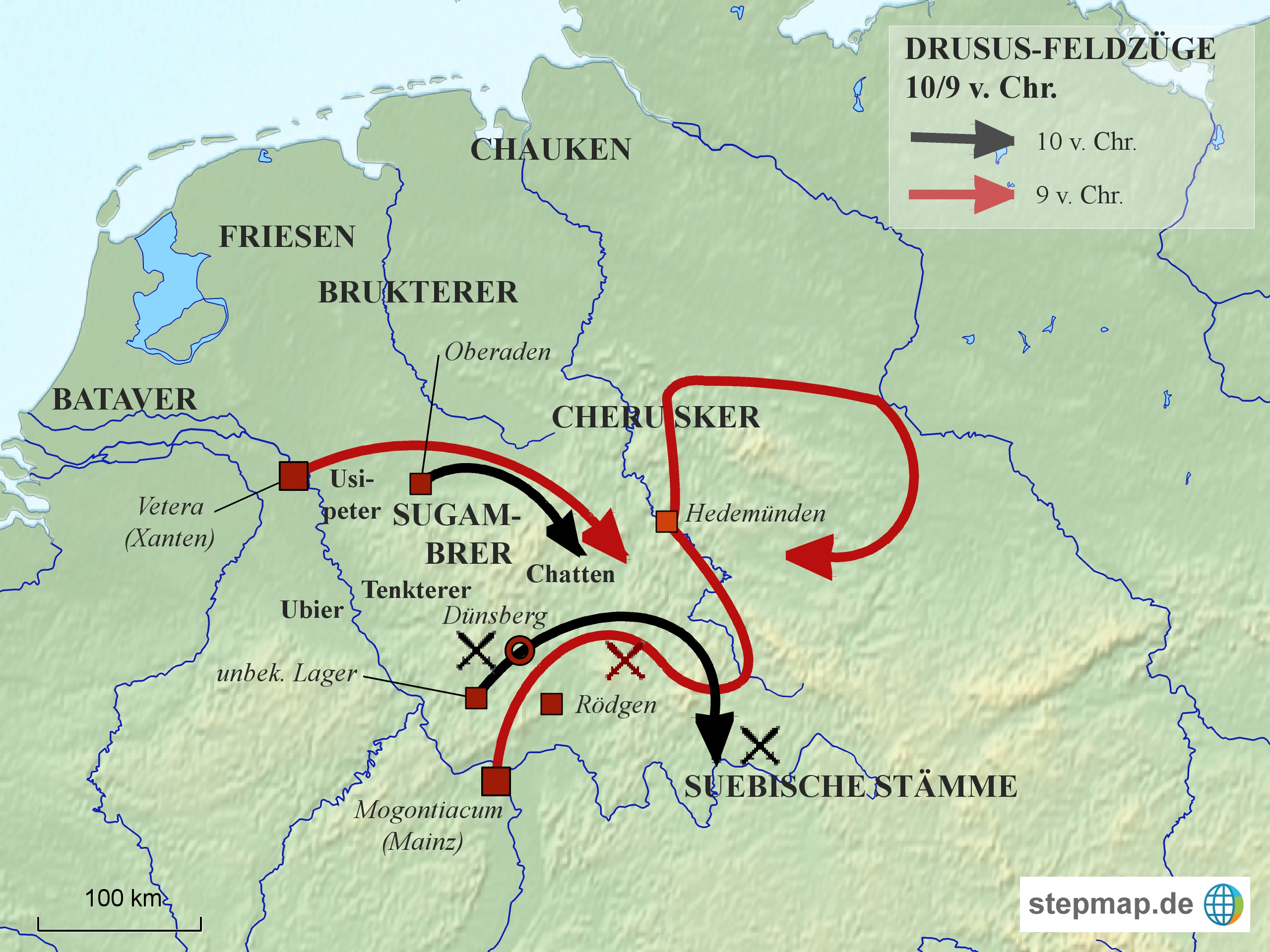 Römische Feldzüge 10 und 9 v. Chr. in Germanien